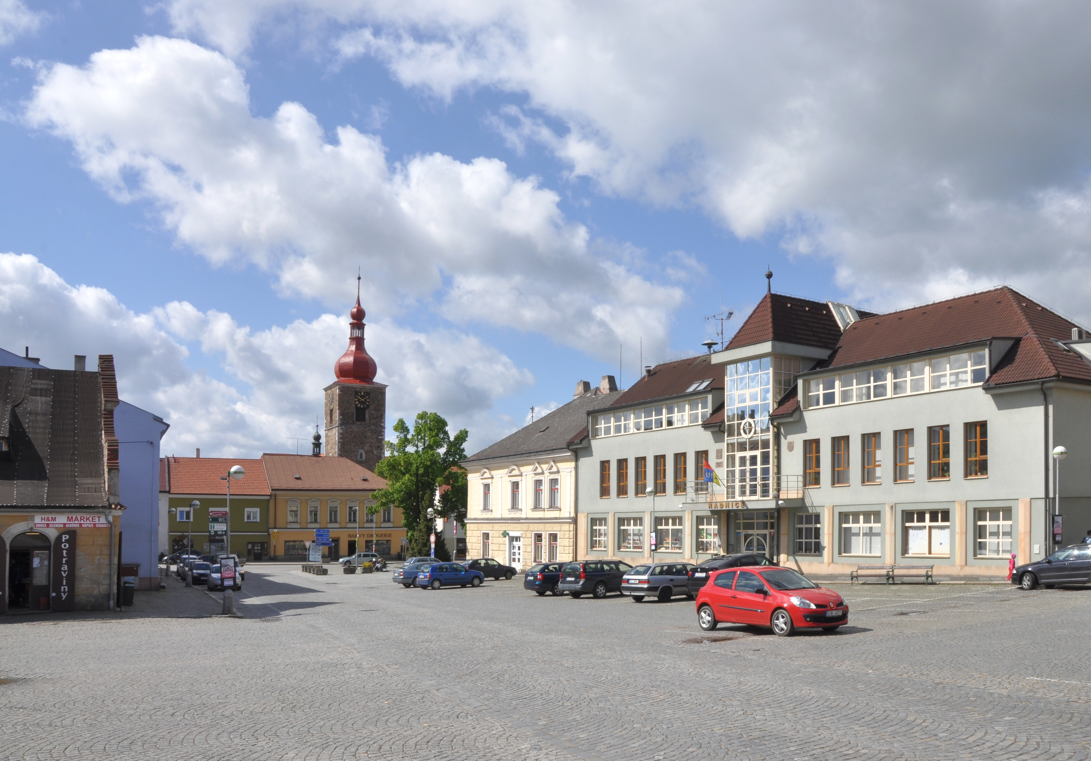 Bechyňovo náměstí. Vpravo radnice města a v pozdí kostel Narození sv.Jana Křtitele. Město Přibyslav. Okr.Havlíčkův Brod. Kraj Vysočina. Czech Republik.